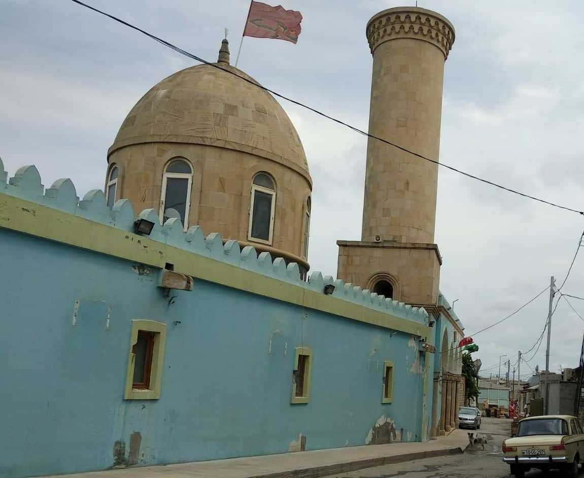 Köhnə bazar meydanında Hacı Aslan məscidi